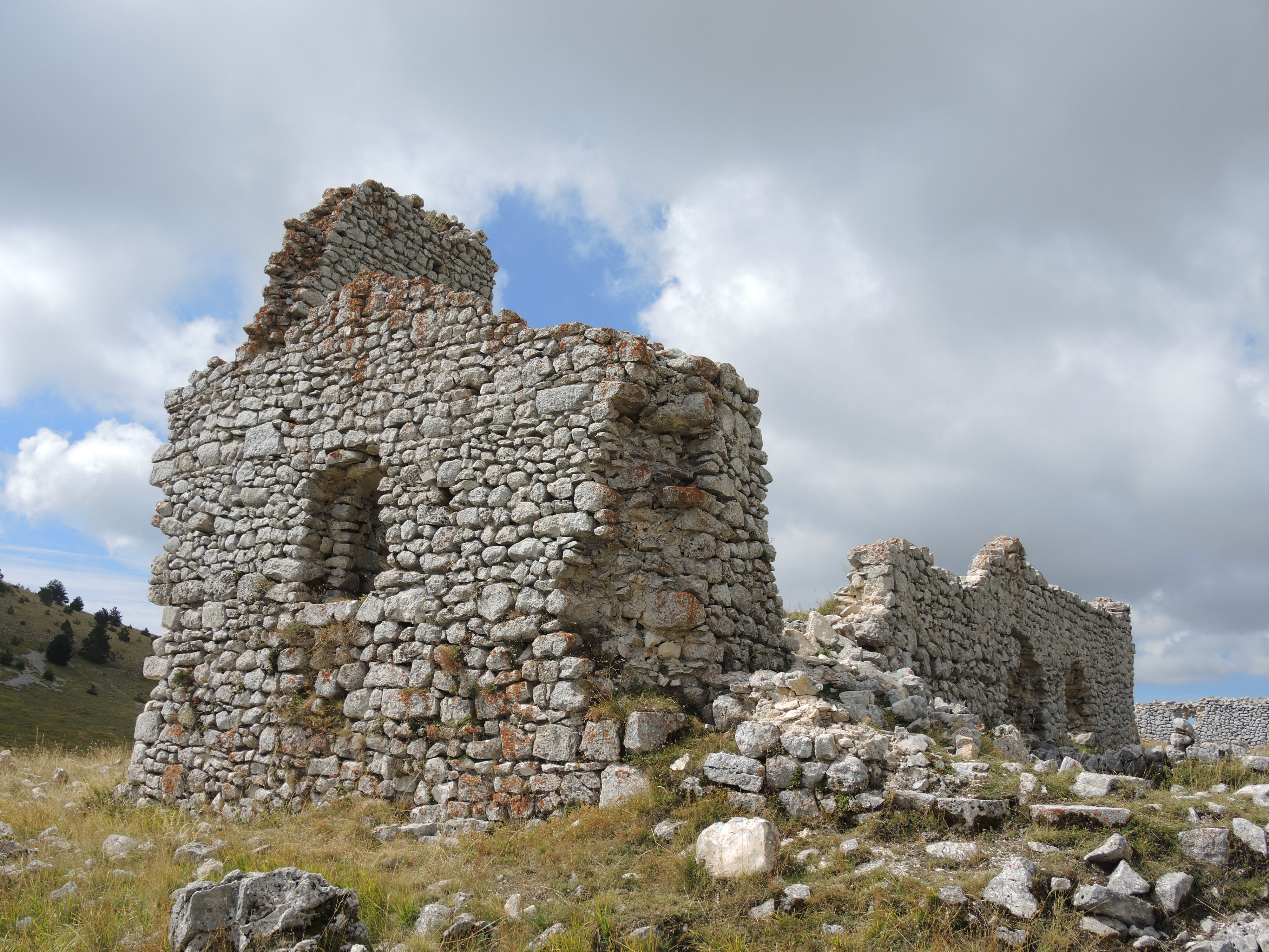 Campo Imperatore (AQ) - Monastero di Santa Maria del Monte